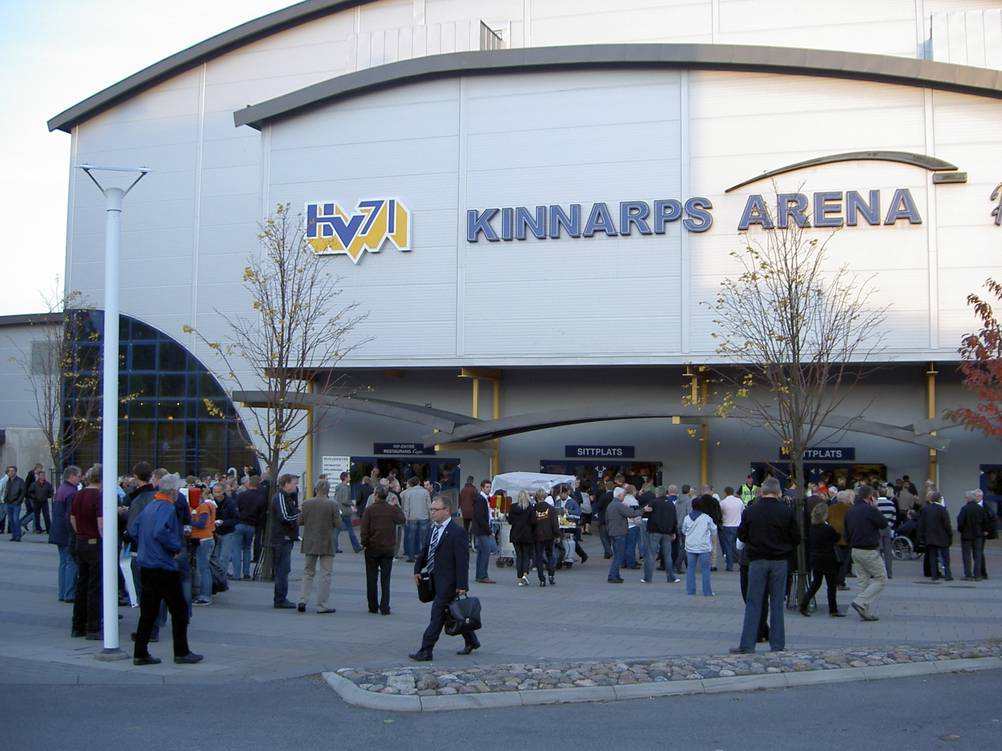 Kinnarps Arena, Jönköping, inför säsongspremiärmatchen HV71-Frölunda HC (6-5) i Elitserien i ishockey.